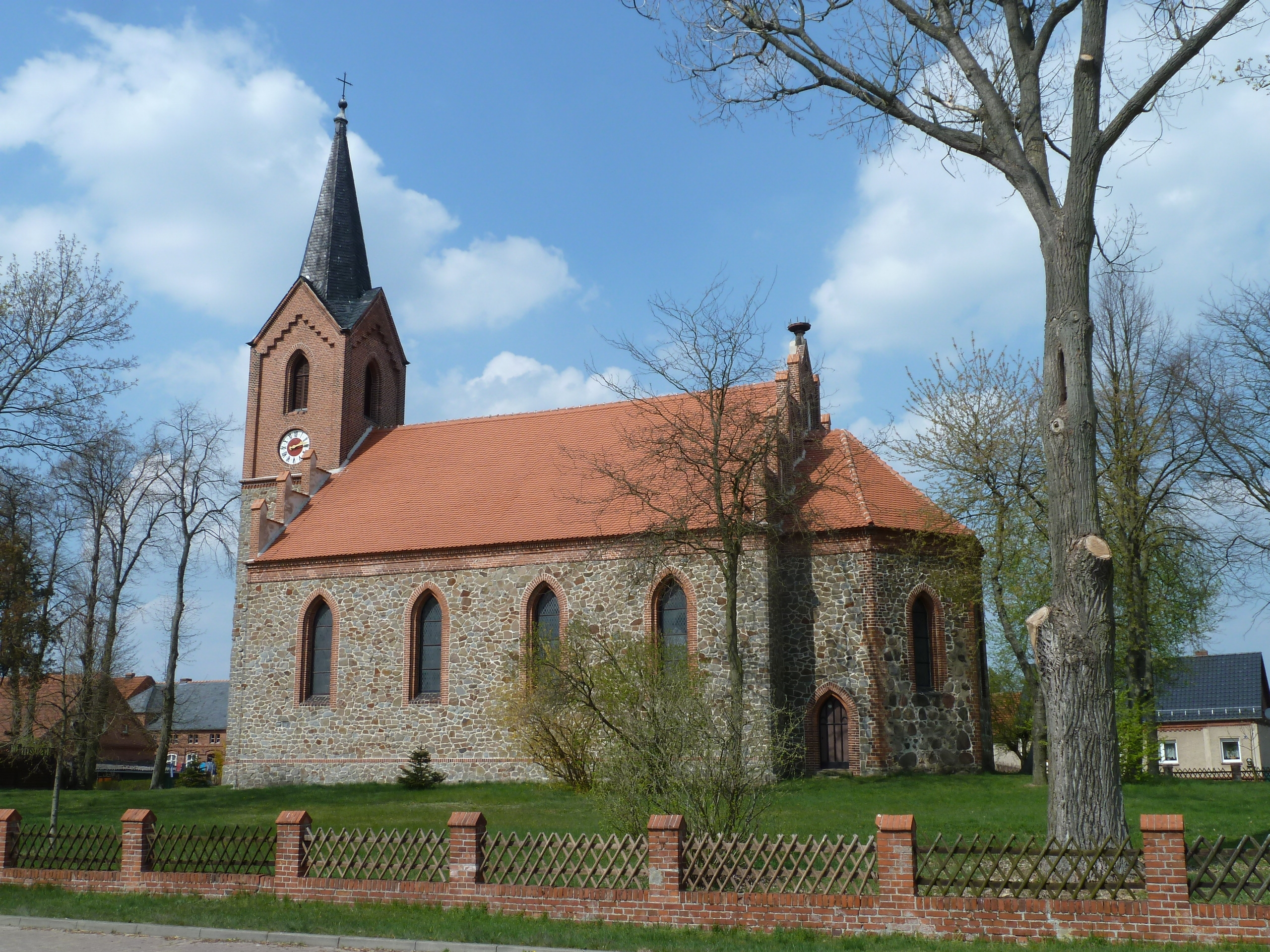 neugotische Dorfkirche in Glöwen, Baudenkmal